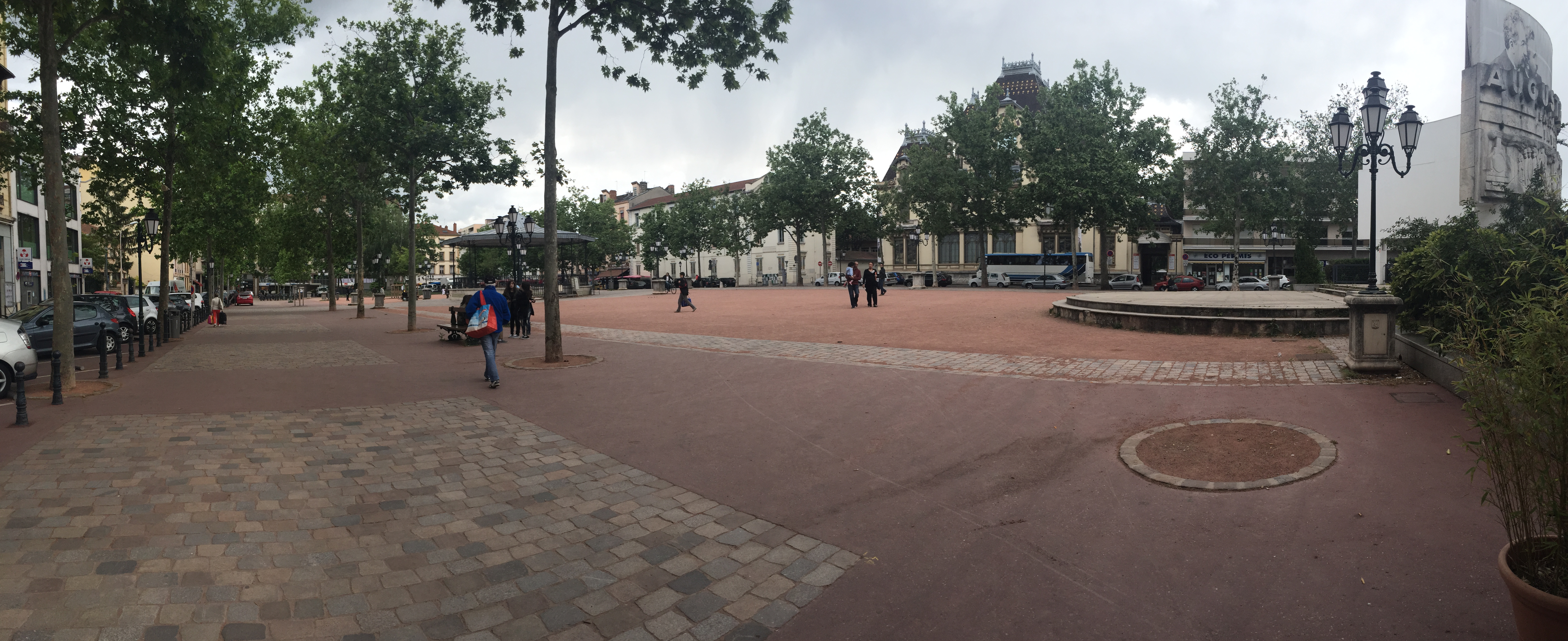 Place Ambroise-Courtois à Lyon.